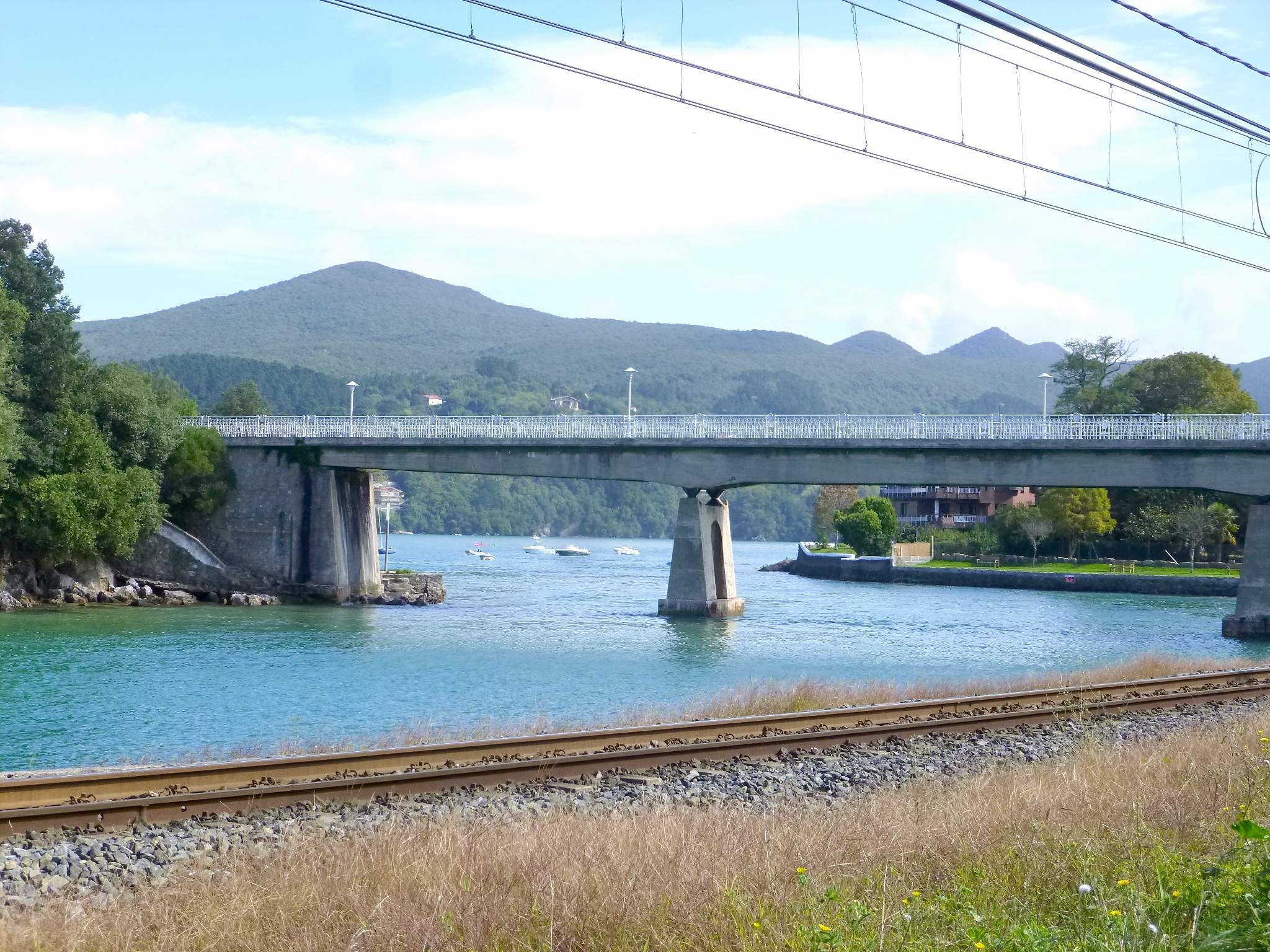 Sukarrieta (Pedernales) - Isla de Txatxarramendi